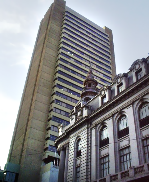 Edificio del Banco Central de Bolivia, La Paz, Bolivia.